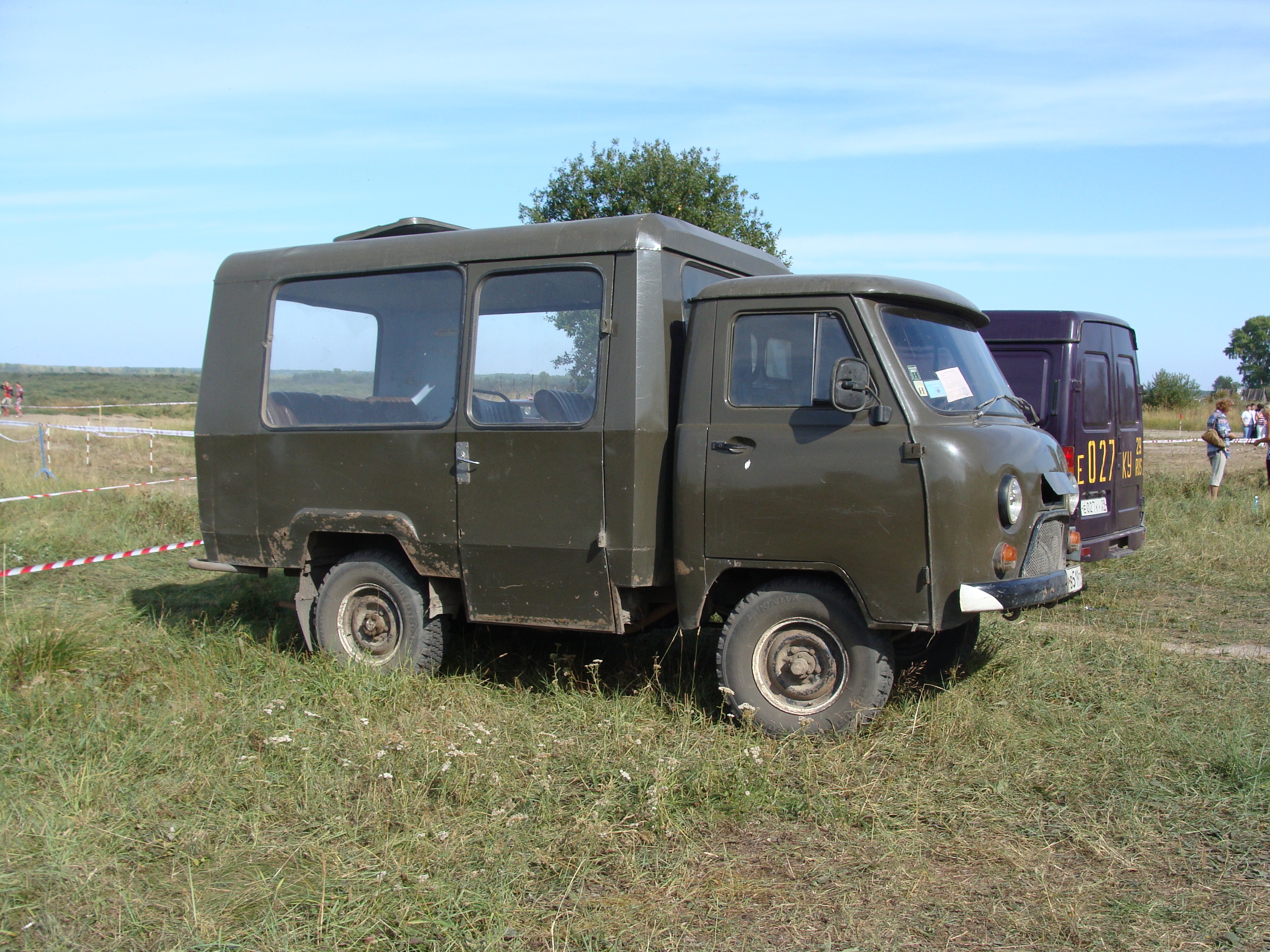 Автоклуб Т12.02 на базе УАЗ-452